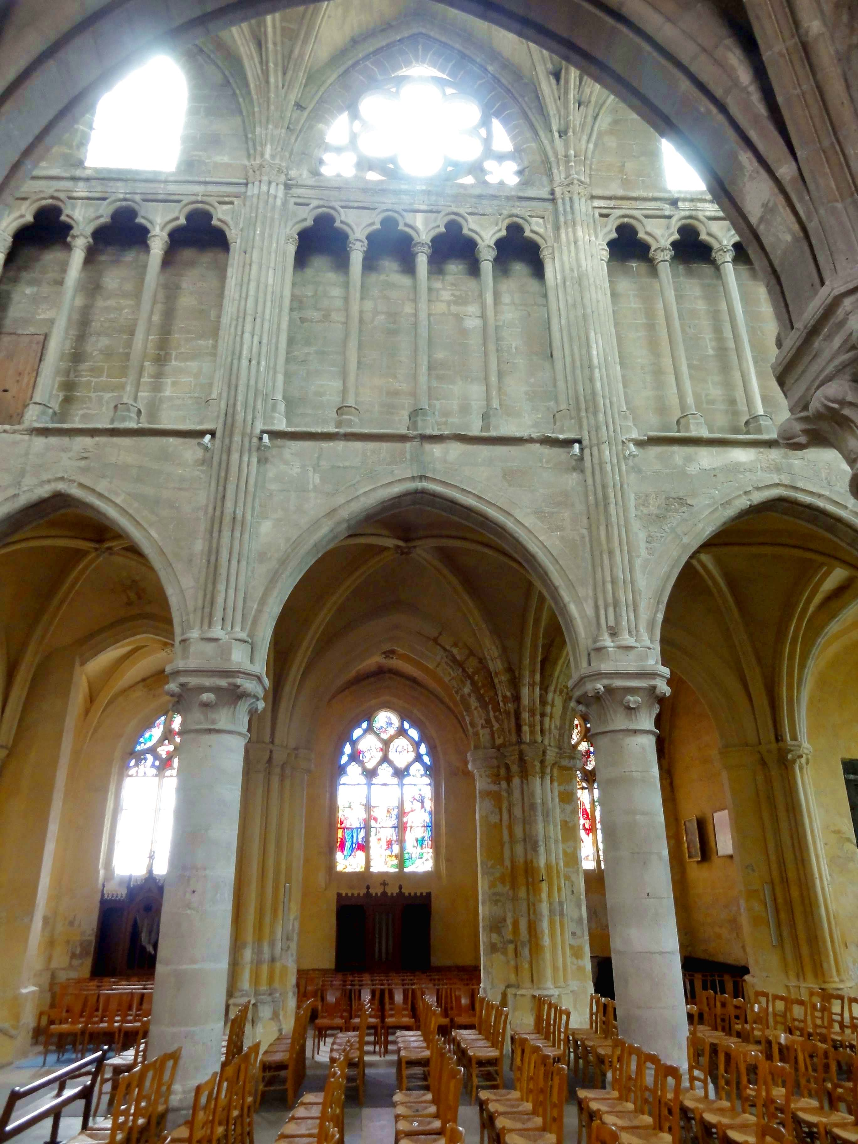 Intérieur de l'église - voir titre.